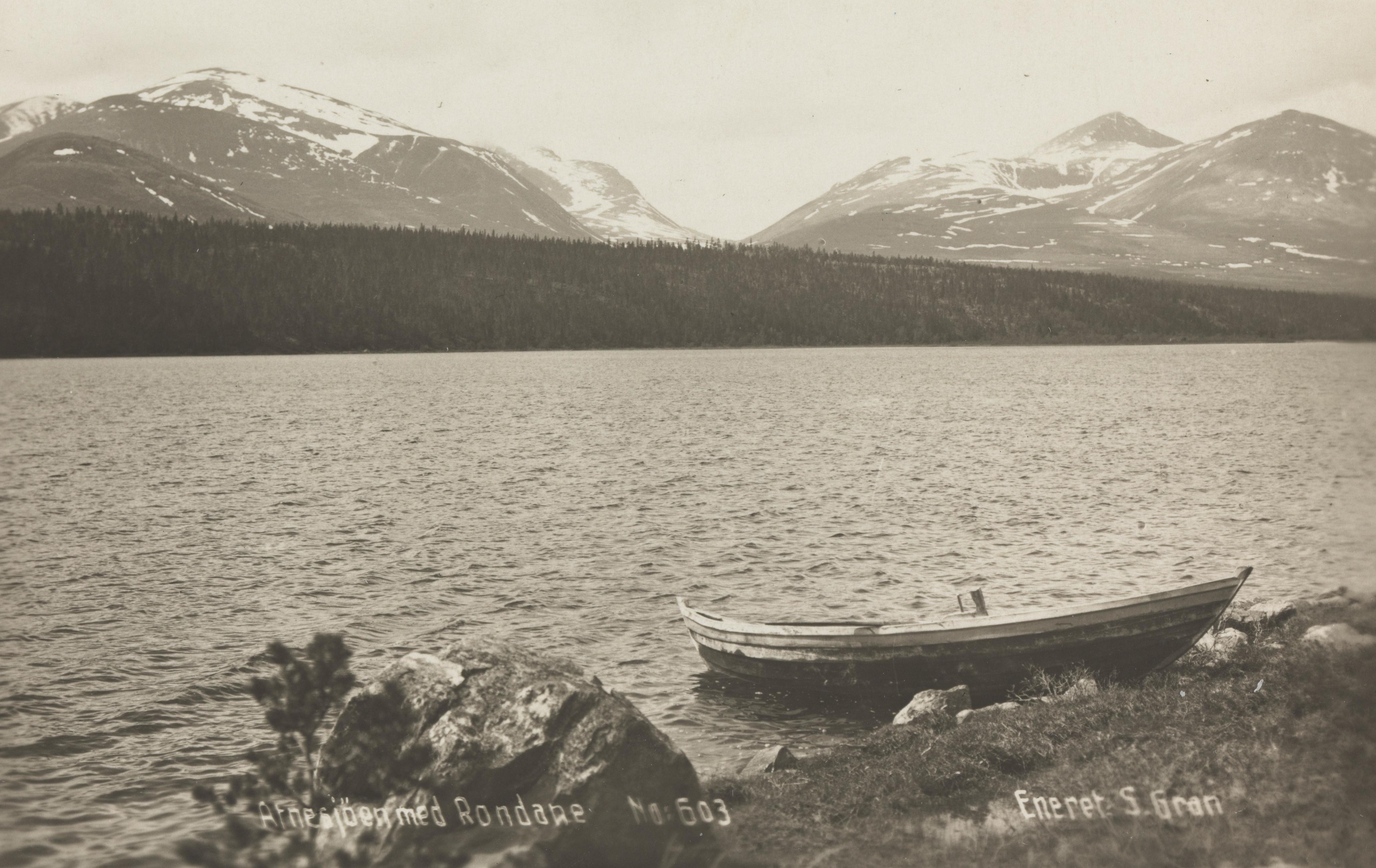 Bildet er hentet fra Nasjonalbibliotekets bildesamling Atnesjøen, Stor-Elvdal, Hedmark